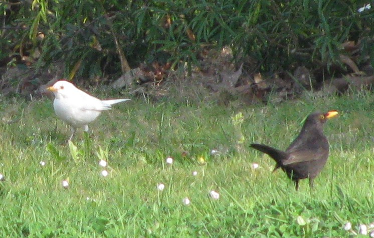 Merle noir...et merle blanc. Vannes, France